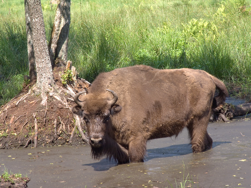 Еўрапейскі зубр. Беларуская (тарашкевіца): Эўрапейскі зубар.